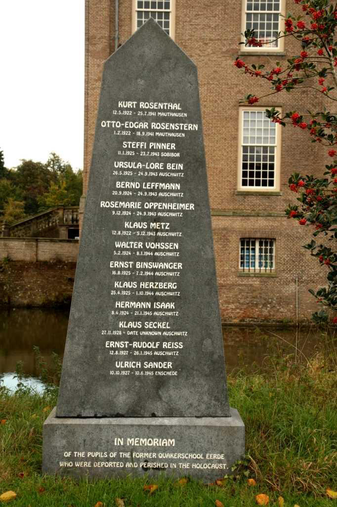 Dieser Gedenkstein steht auf dem Gelände der heutigen International School Eerde und erinnert an die 14 jüdischen Schülerinnen und Schüler der ehemaligen Quäkerschule Eerde, die Opfer der nationalsozialistischen Verfolgung wurden.